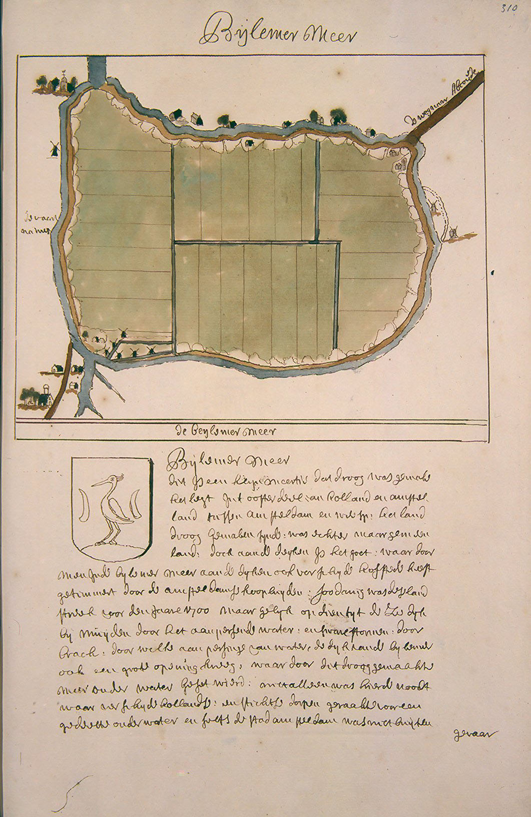 Beschrijving en Afbeelding der Steden, Dorpen, Gehugten Adelijke en andere Gebouwen in Westfriesland, Waterland, Kennermerland, en Aankleve van Dien, Dus beschreven en bij een Versamelt, Mitsgaders, in Alphabetise Ordre Geschikt door Andries Schoemaker